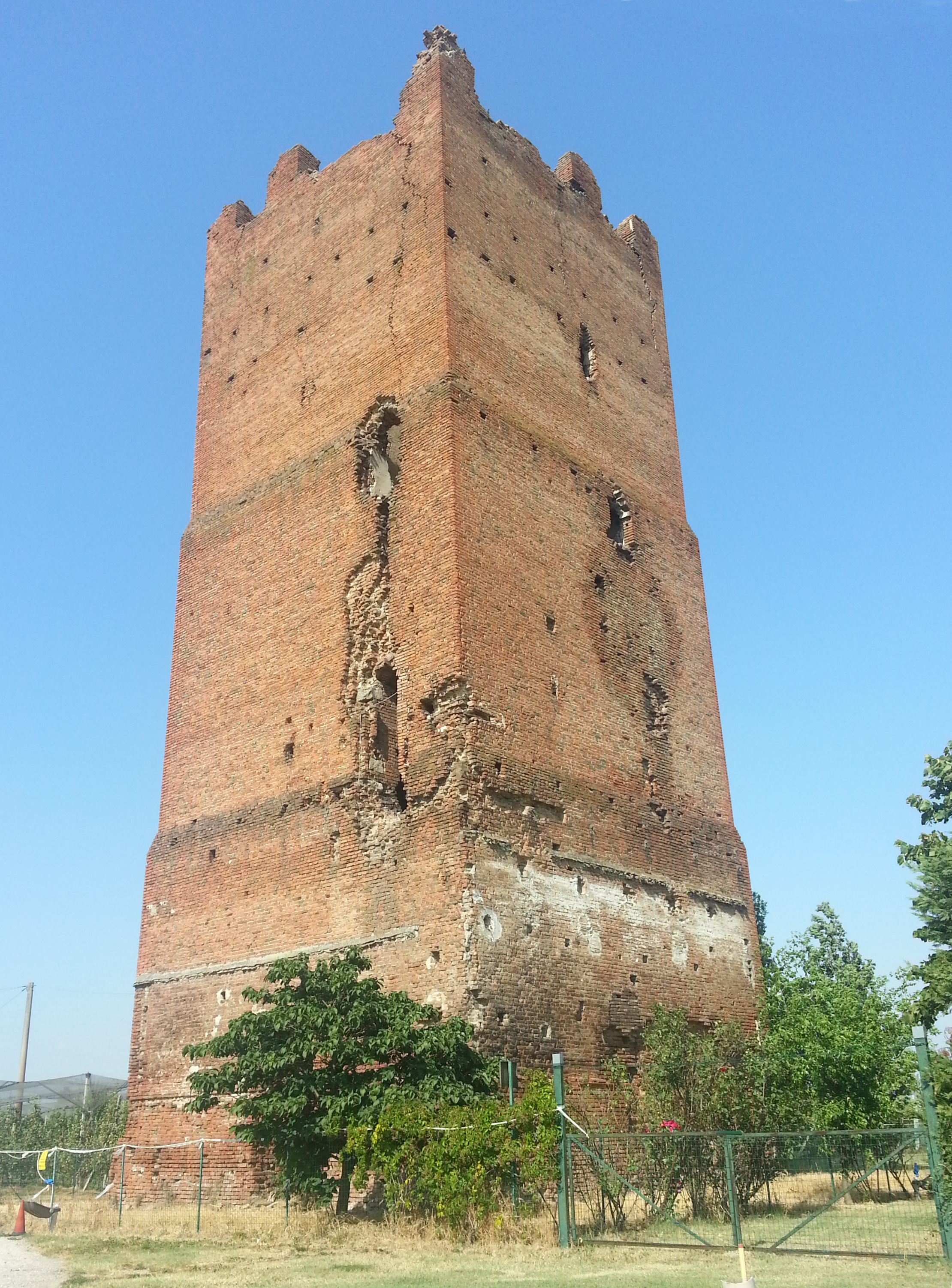 Poggio Renatico - antica torre dell'Uccellino del 1242